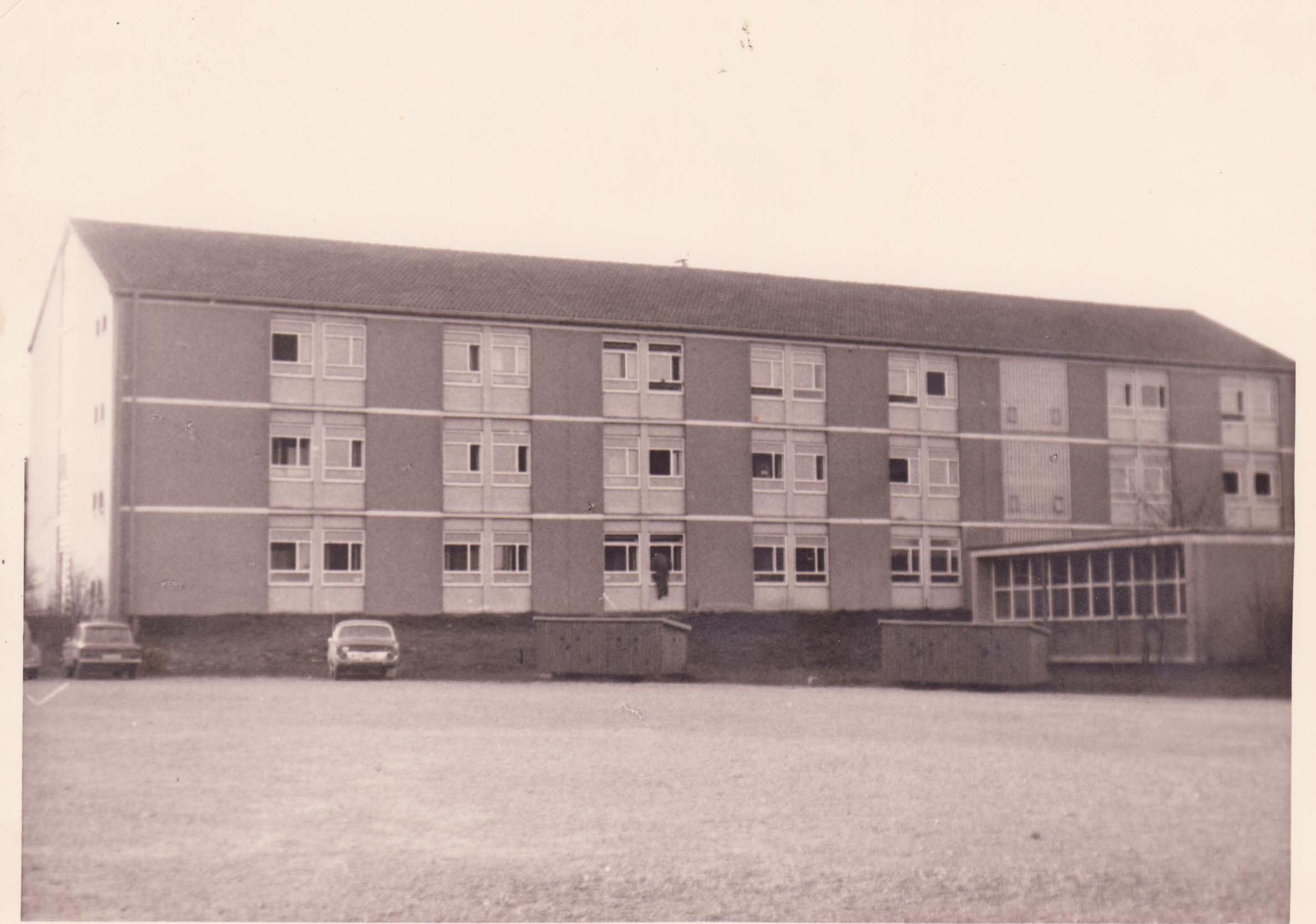 Kasernengebäude Tillykaserne Neuburg Unterkunftsgebäude der 3.Instansetzungskompanie Versorgungsbataillon 286 in Neuburg an der Donau 1969